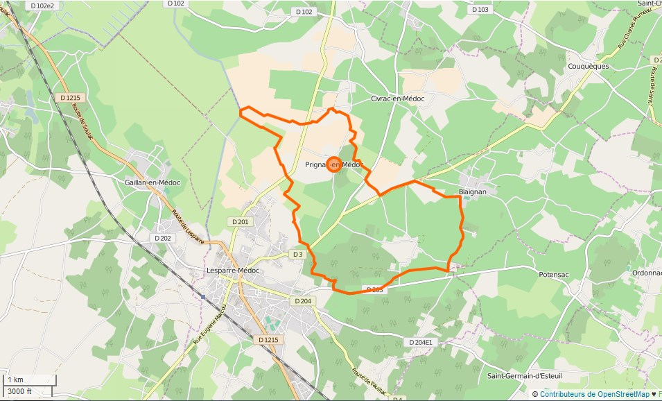 Prignac-en-Médoc Limite communale This map may be incomplete, and may contain errors. Don't rely solely on it for navigation.